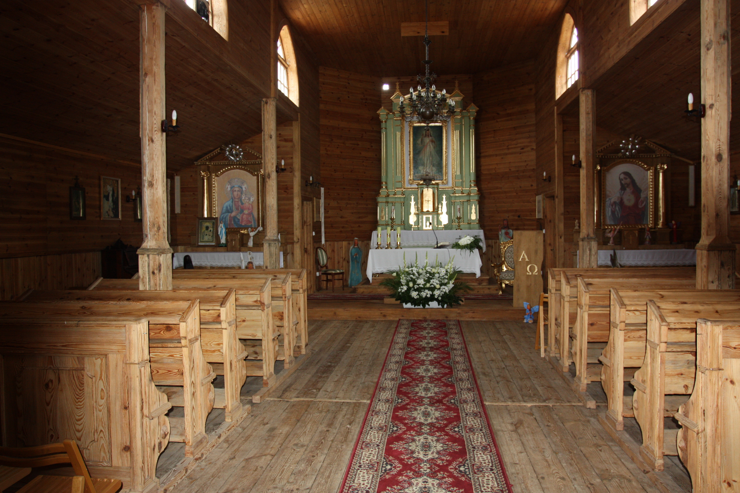 Łochów, kościół par. pw. św. Stanisława Kostki (ob. Miłosierdzia Bożego), 1932 (przeniesiony w 2010 r. z Wólki Dobryńskiej gm. Zalesie pow. bialski woj. lubelskie)